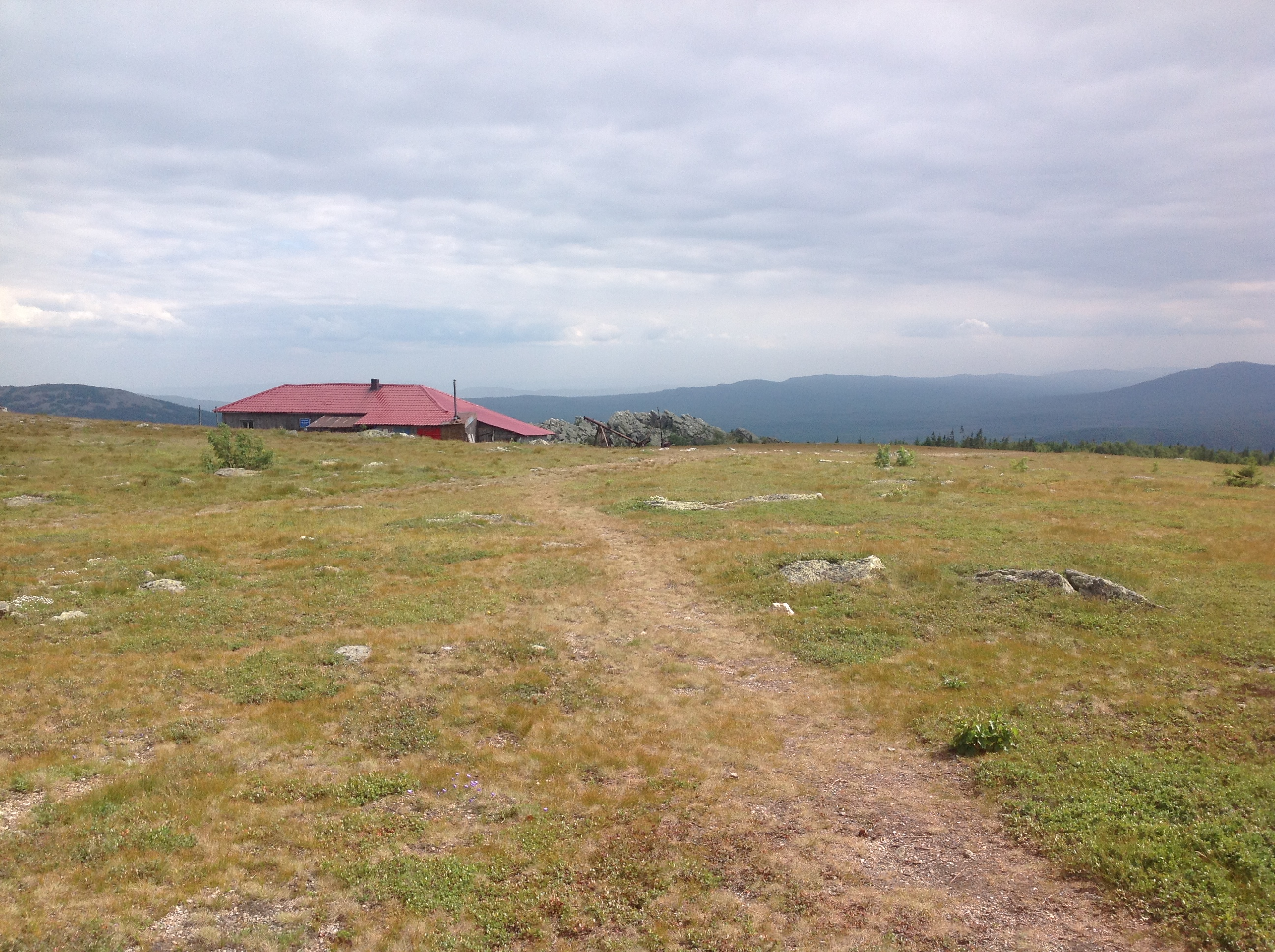 Дорога к метеостанции "Таганай-гора"